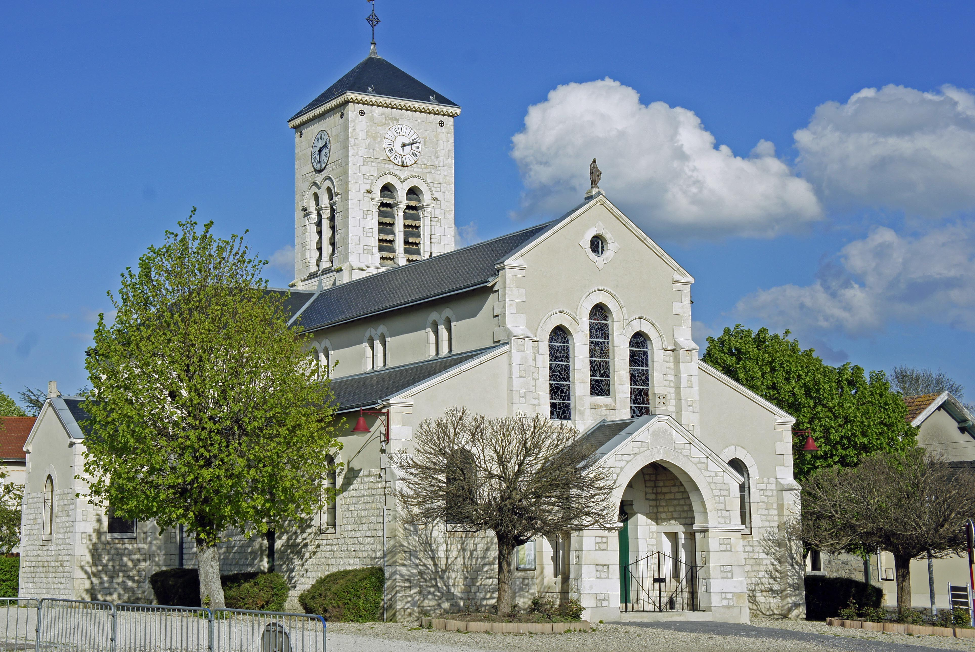 Vue de l'Église de Courcy.